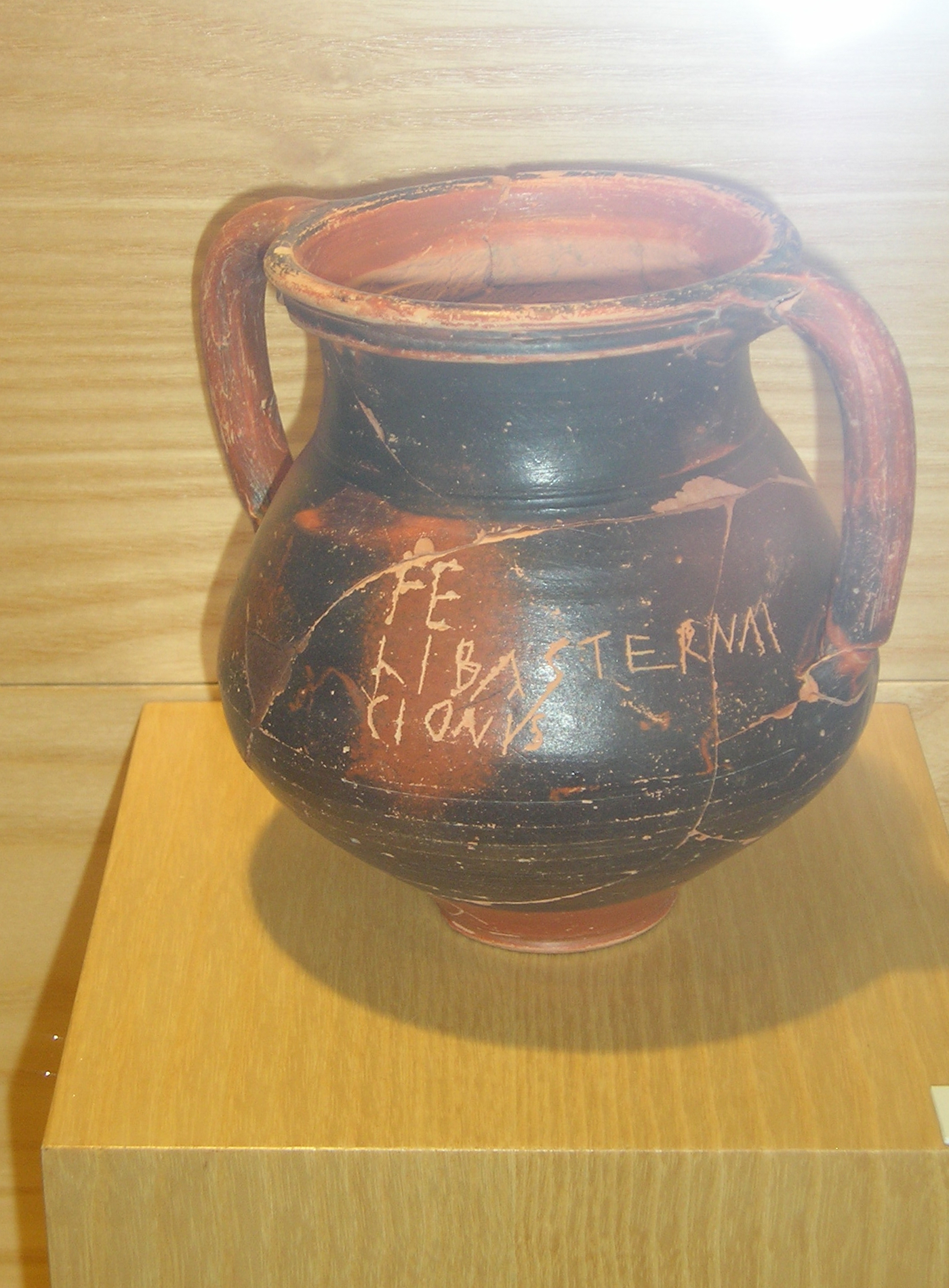 Vaso de cerámica campaniense con grafito en escritura cursiva en latín, depositado en el Museo Arqueológico Provincial de Huesca. Hispania Epigraphica 24934